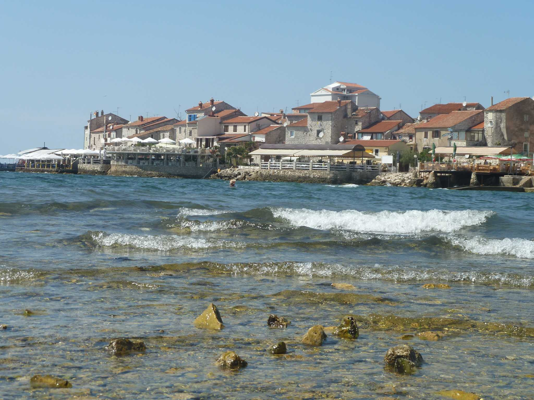 Umag z pláže